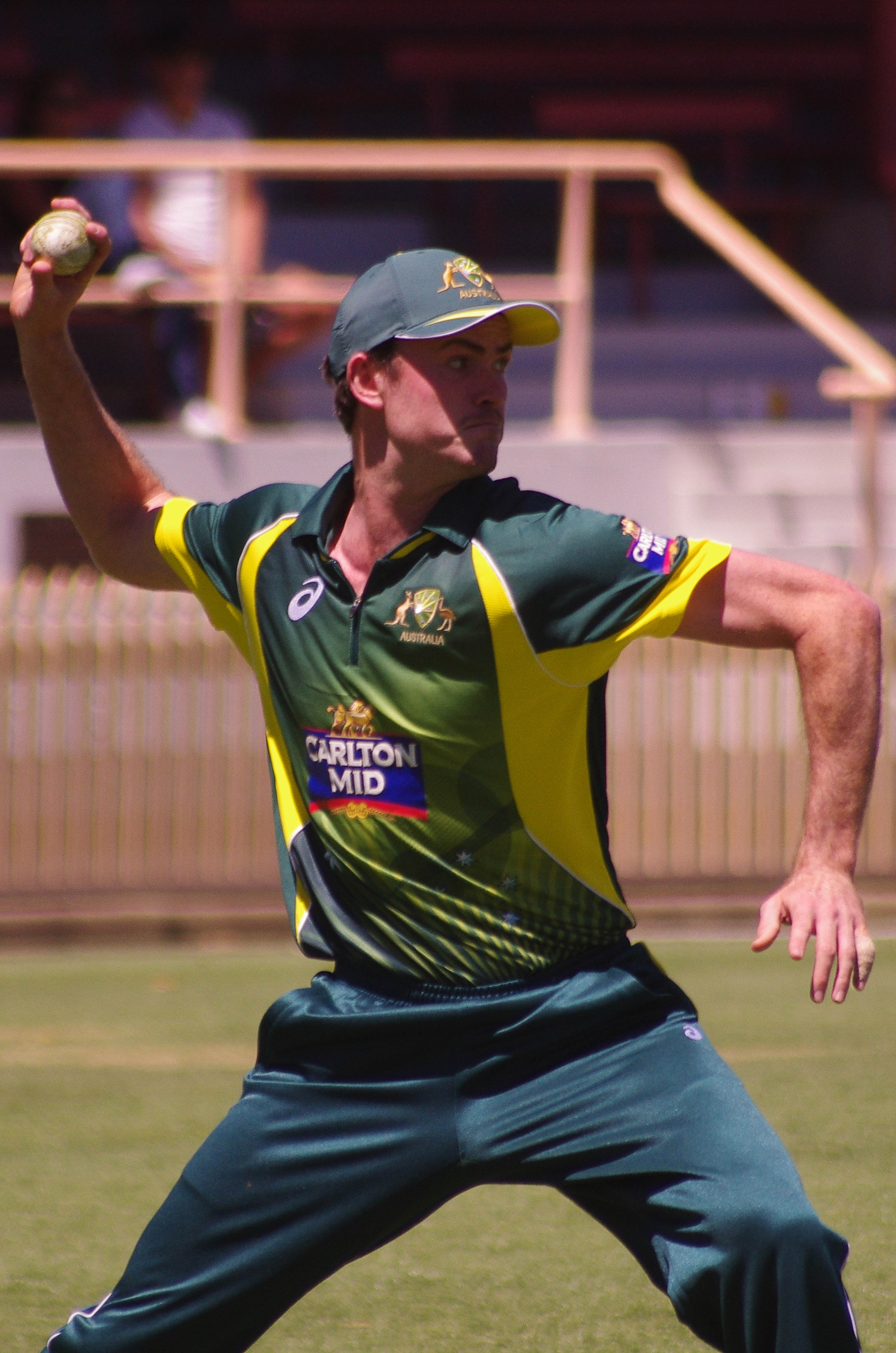 ASHTON TURNER